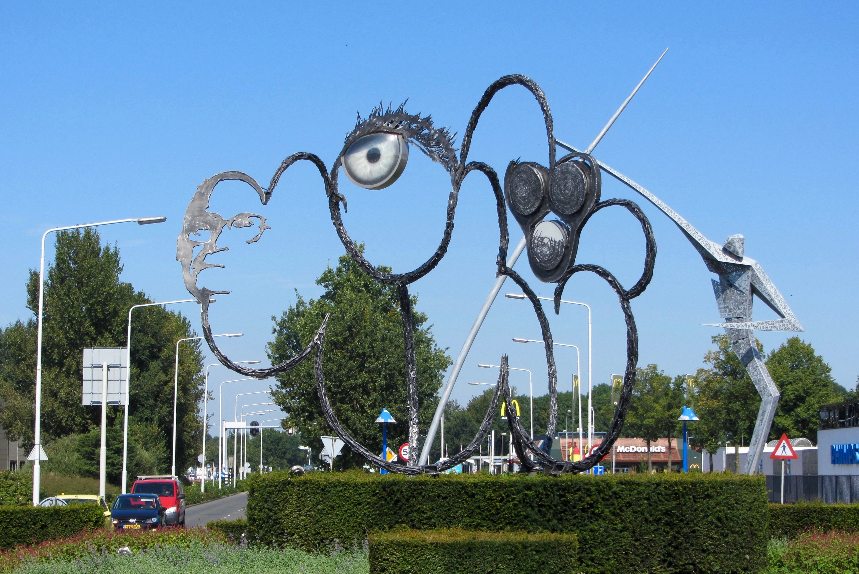 Hans Mes,2011